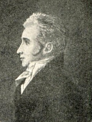 Феликс Павел Яроцкий (14 января 1790 года, Пацанув — 25 марта 1865 года, Варшава) — польский зоолог и энтомолог.